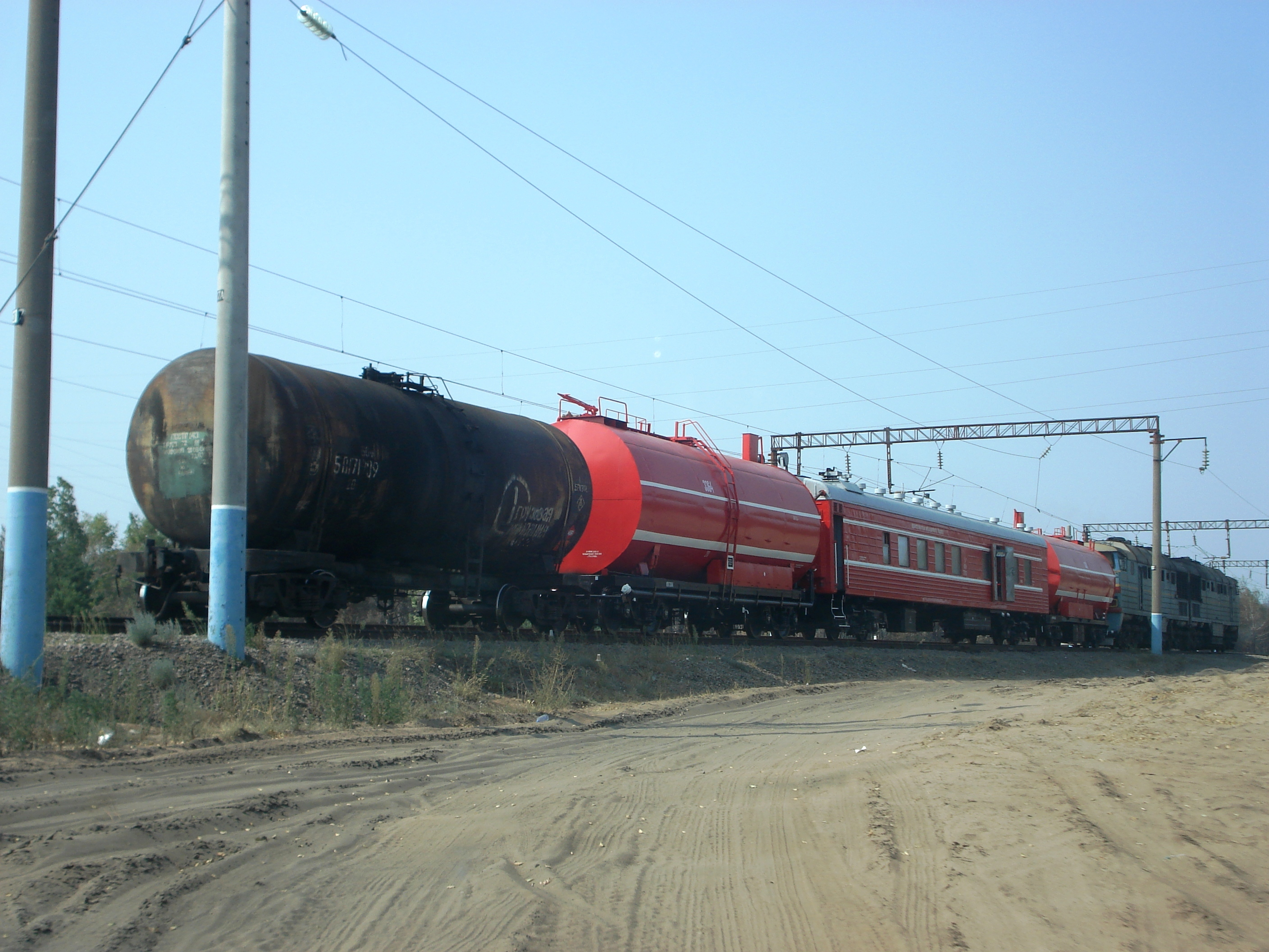 Пожарный поезд в Масловке